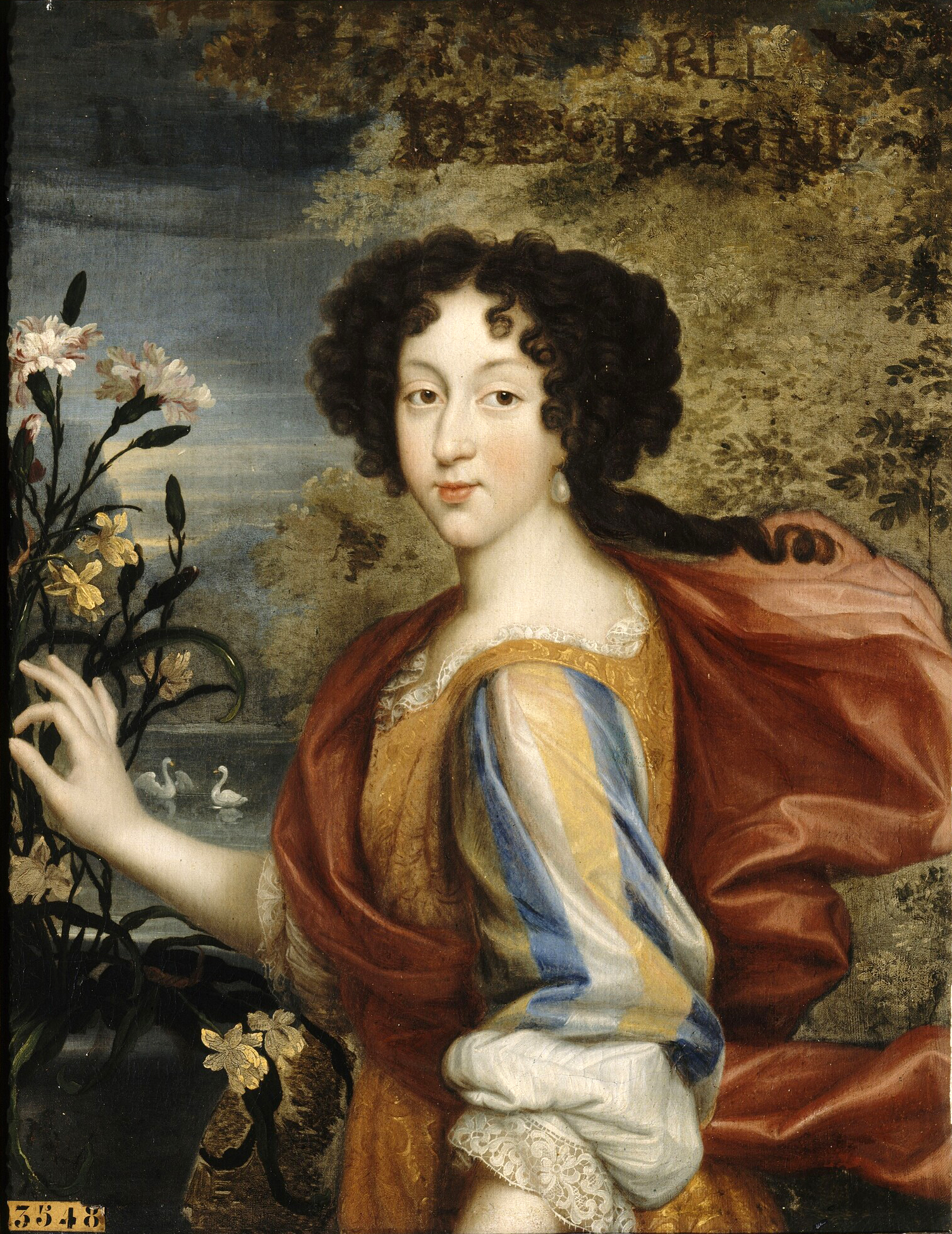 Représentée avant son mariage en 1679 avec Charles II roi d'Espagne